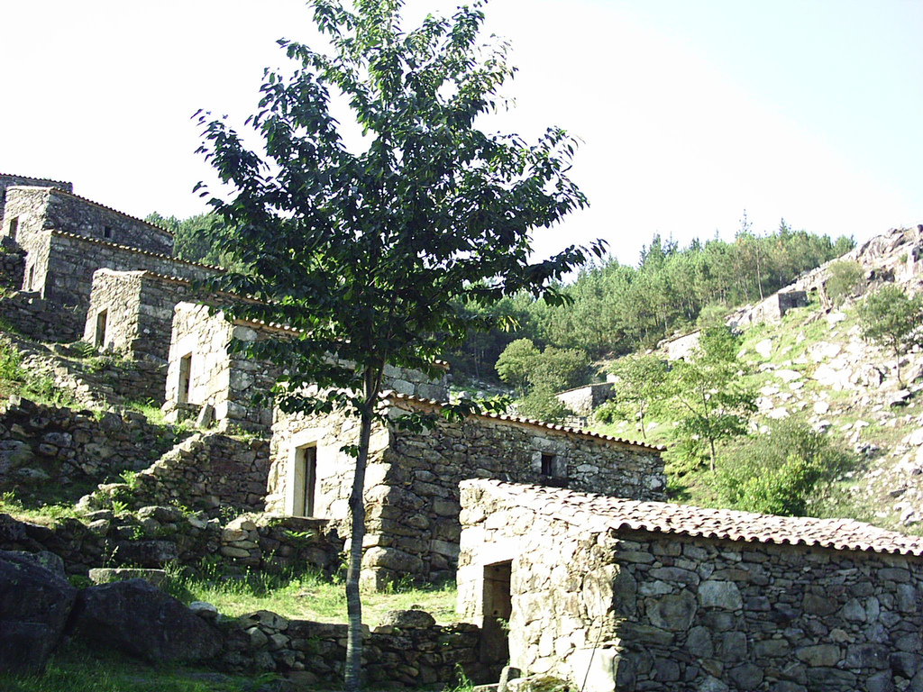 Muiños do Folón no Rosal provincia de Pontevedra, Galicia)'Muiños do Folón'